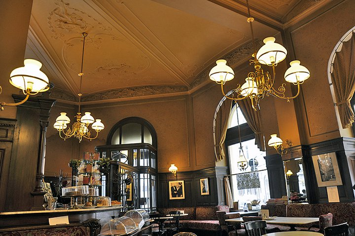 Innenansicht